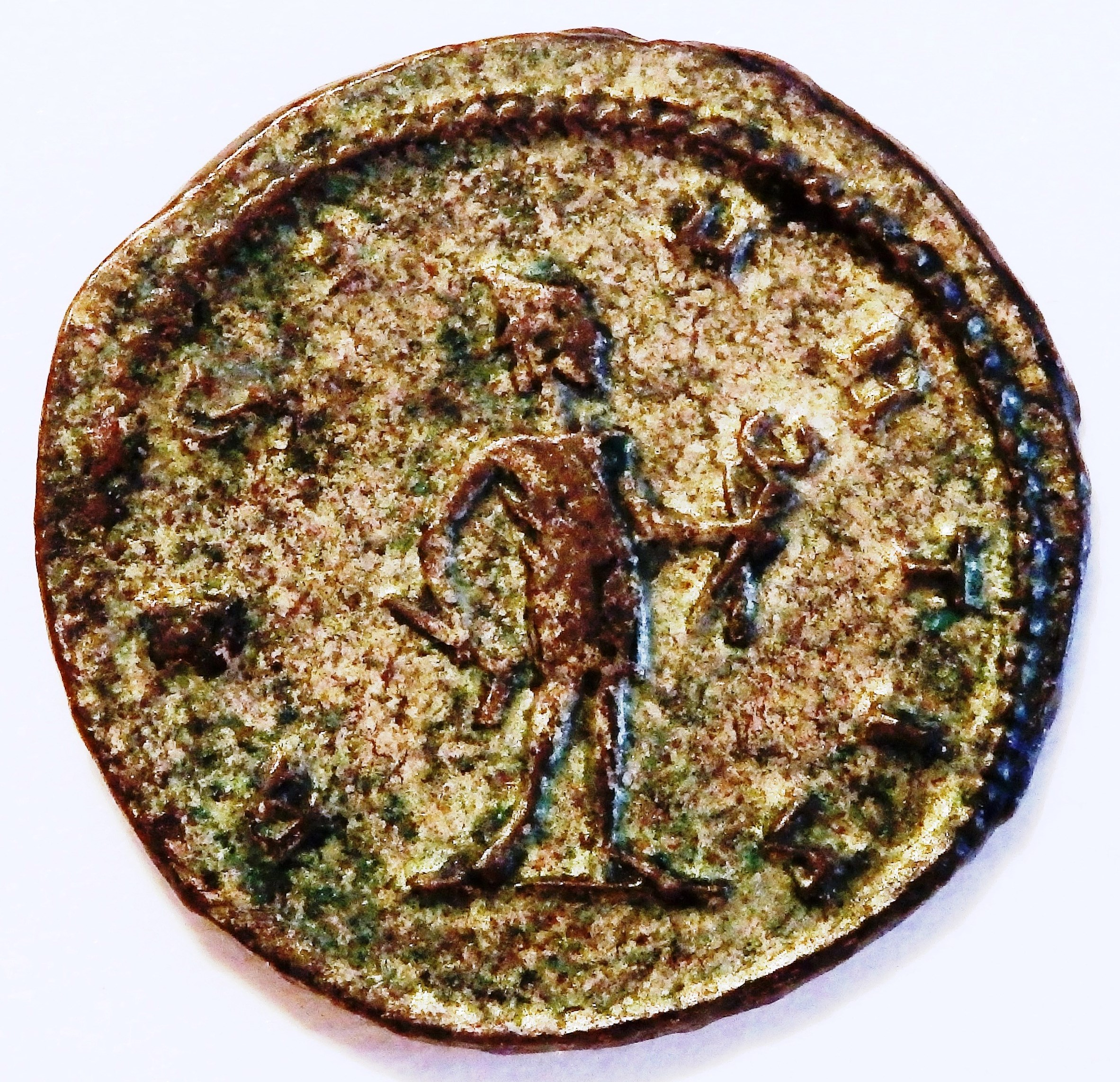 Kabir mit Zange und Hammer, Antoninian des Claudius Gothicus, Kampmann 104.63